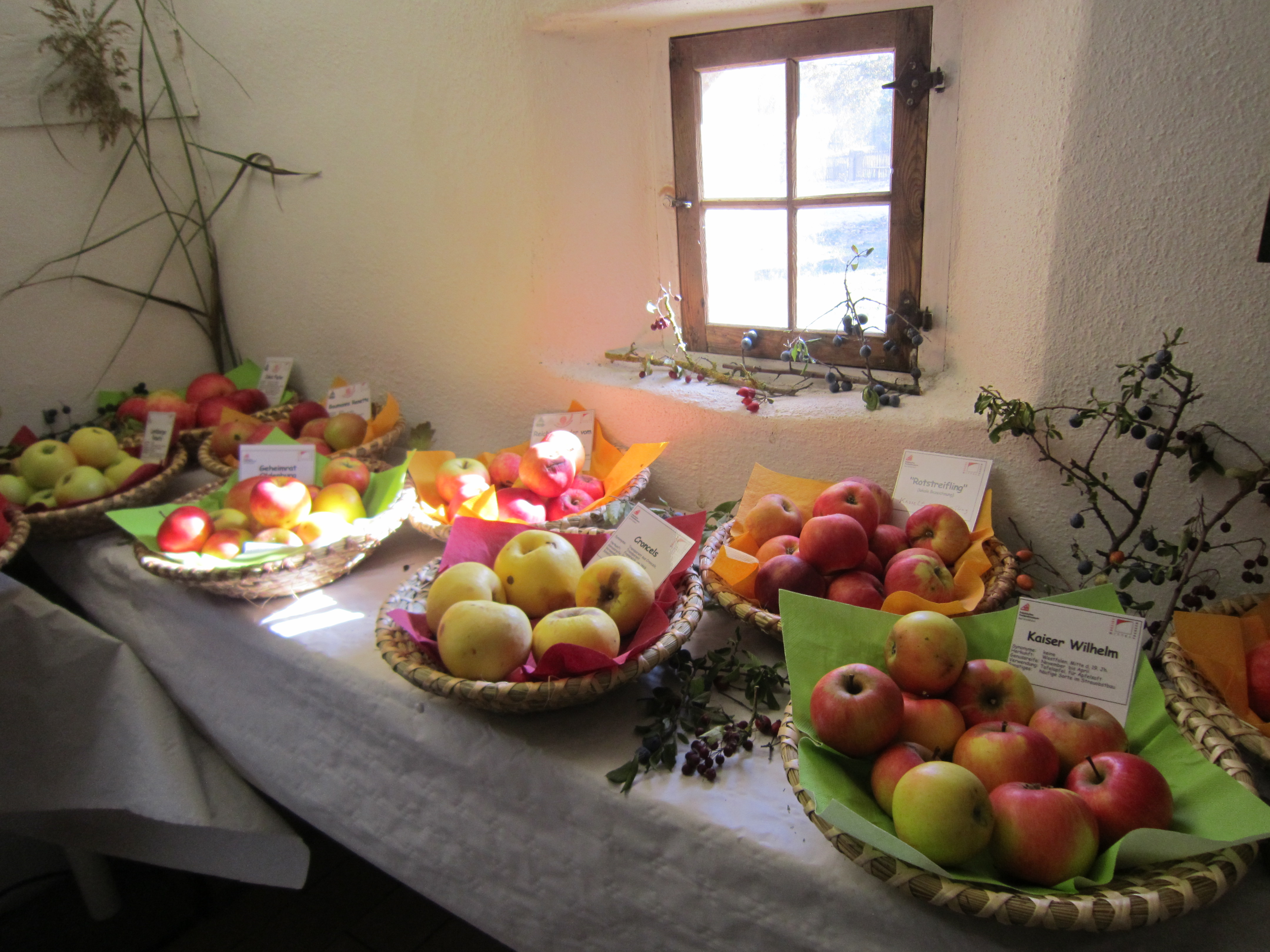 Präsentation von Obst auf dem Gelände des Fränkischen Freilandmuseums Bad Windsheim